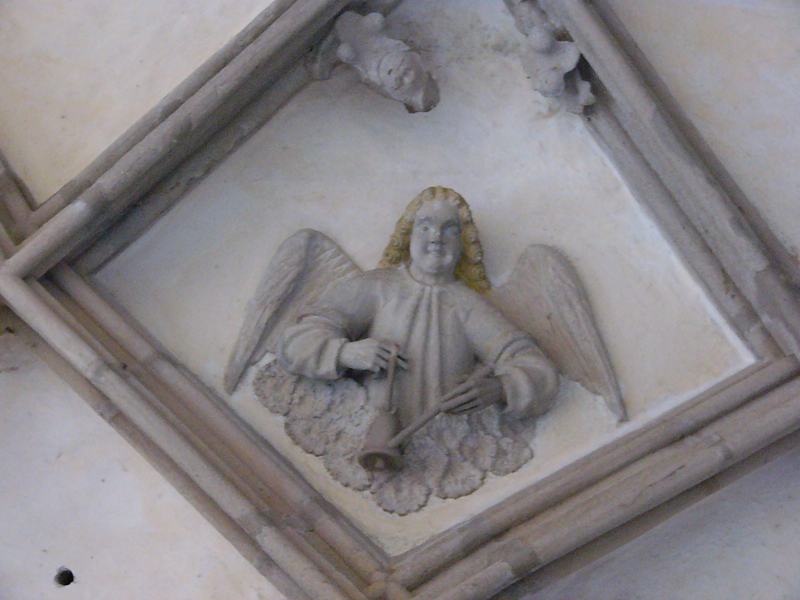 Musizierende Engel im Gewölbe des Himmelkroner Kreuzgangs